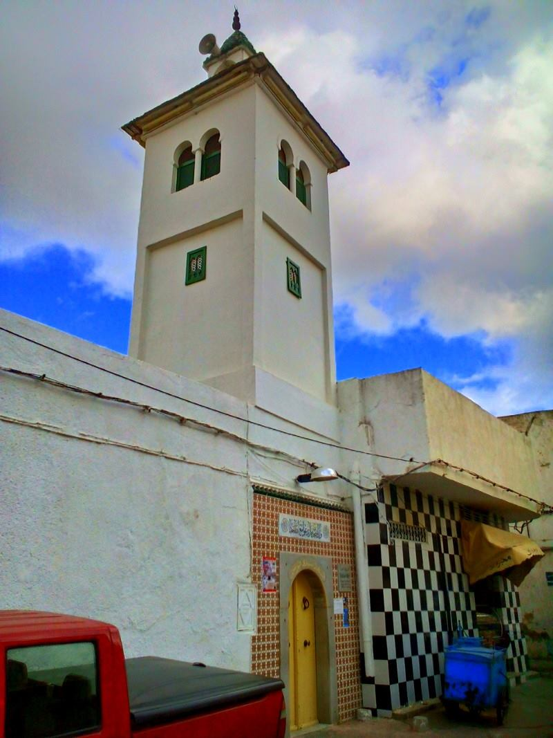 Rue Naceur Ben Jafar, Tunis, Tunisie نهج الناصر بن جعفر, تونس العاصمة ، تونس